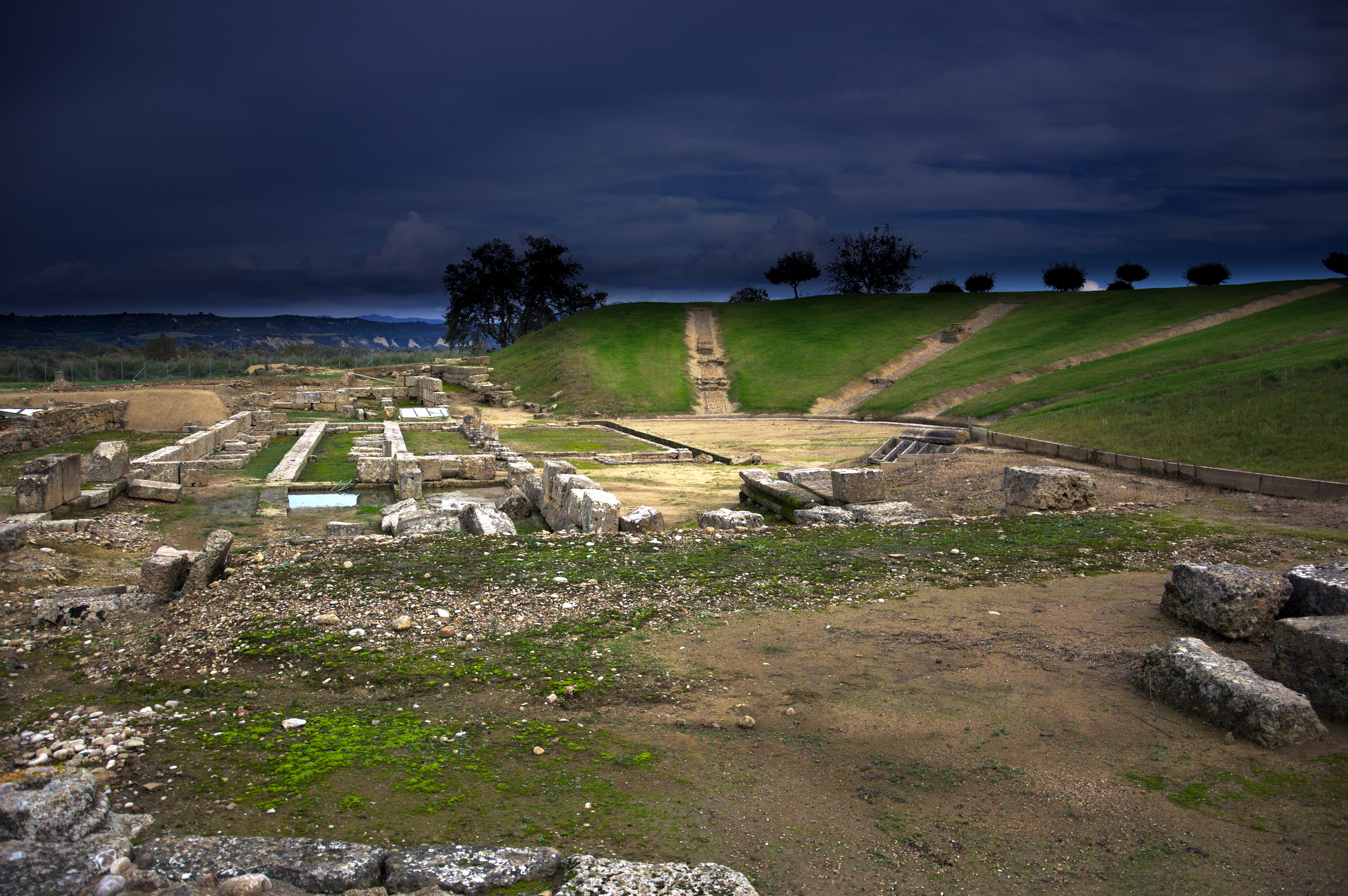 Θέατρο Αρχαίας Ήλιδας Σκηνή και Ορχήστρα του θεάτρου από την Δυτική πλευρά.«Θέατρο Αρχαίας Ήλιδας»